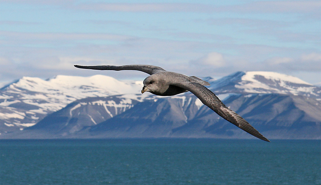 Eissturmvogel (Fulmarus glacialis) im Flug überm Isfjord, Spitzbergen